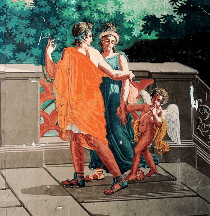 Das Bild zeigt eine Szene aus der Bildertapete im Herrenhaus Borghorst